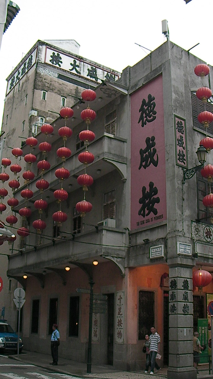 中文（香港）: 德成按